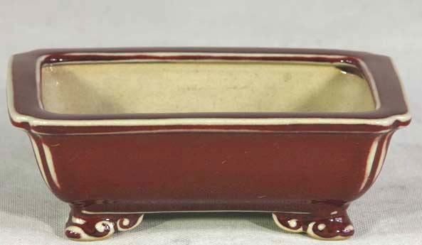 Jeden z wielu modeli doniczki wykorzystywanych w sztuce Bonsai